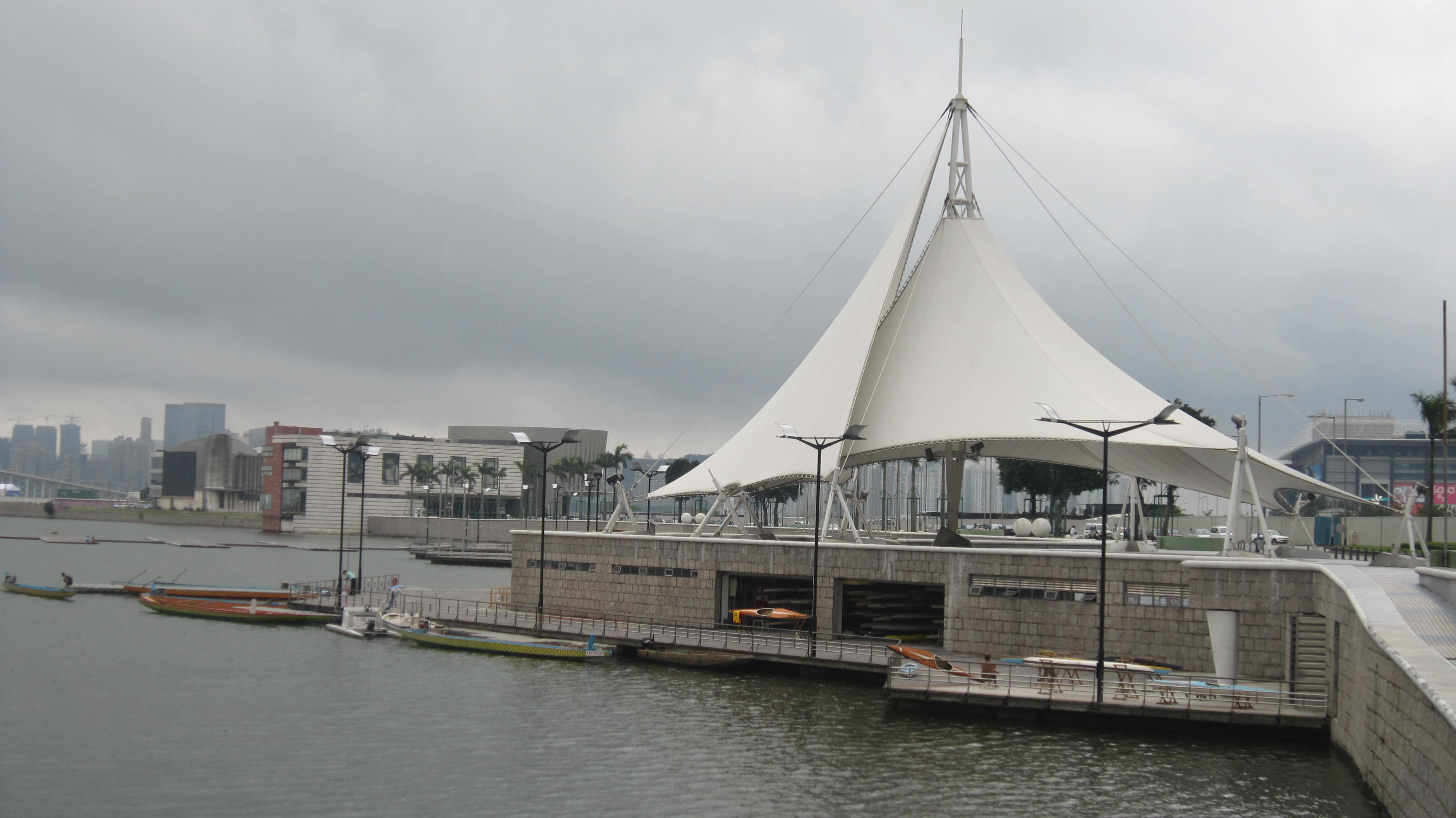 Centro Náutico da Praia Grande